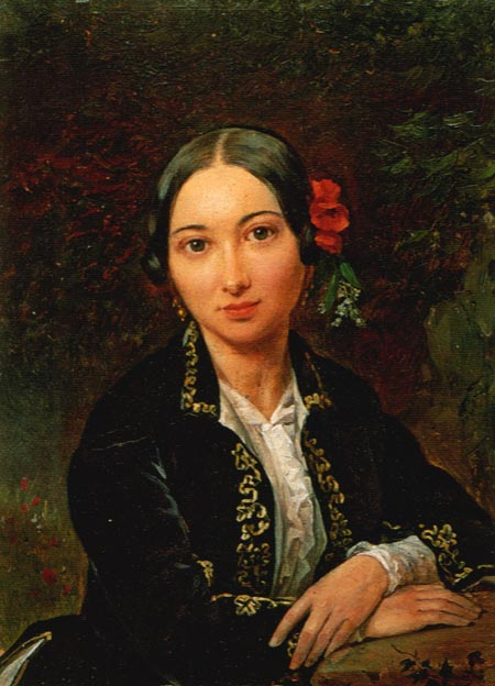 Огарева Мария Львовна (около 1817-1853), дочь помещика Л.Я.Рославлева, племянница пензенского гражданского губернатора А.А.Панчулидзева. С 1836 года жена поэта Н.П.Огарева (1813-1877).